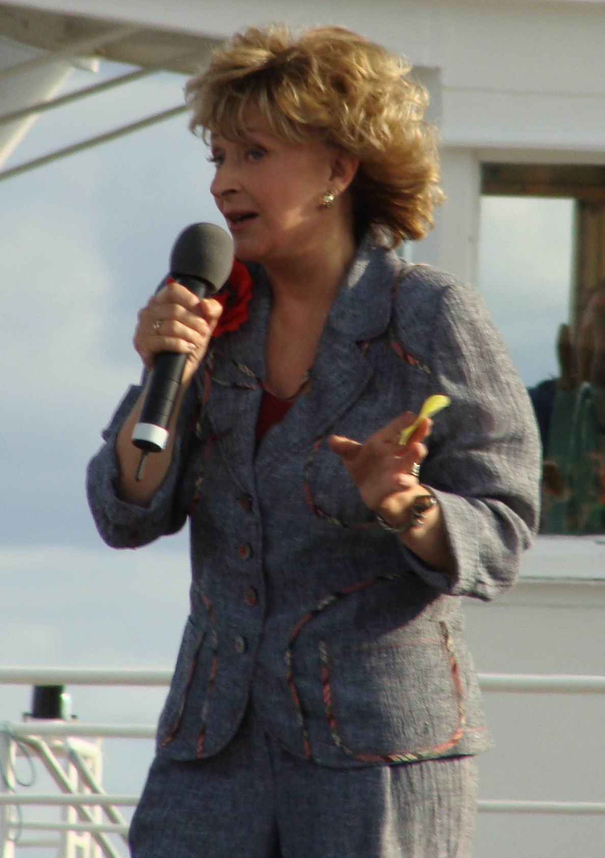 Выступление артистов телепрограммы "Аншлаг" на 425-летии города Архангельска